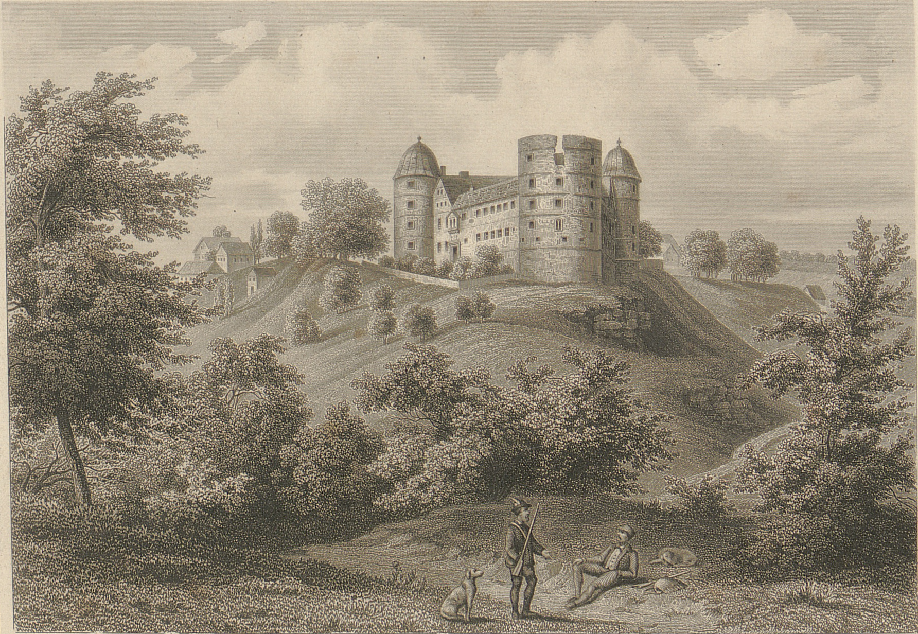 Wewelsburg